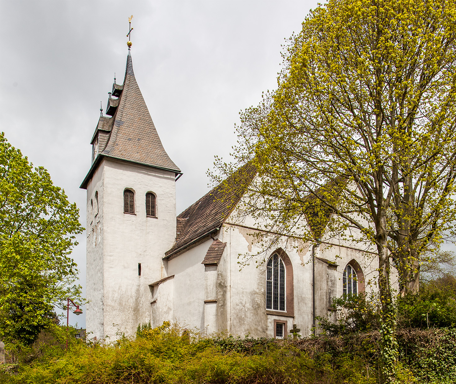 Evangelische Kirche in Talle (Petruskirche) This is a photograph of an architectural monument.